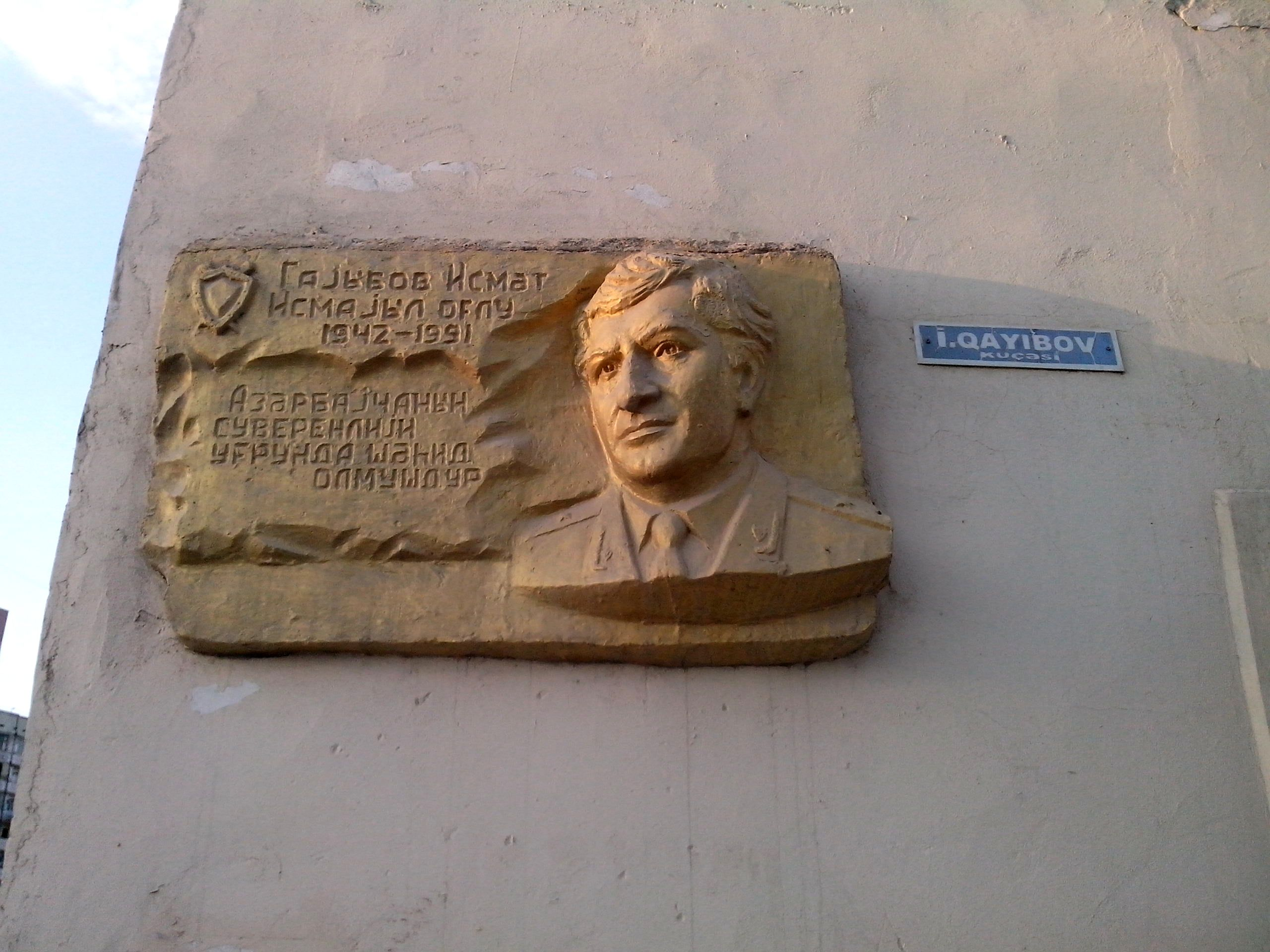 Sumqayıt, İsmət Qayıbov küçəsi